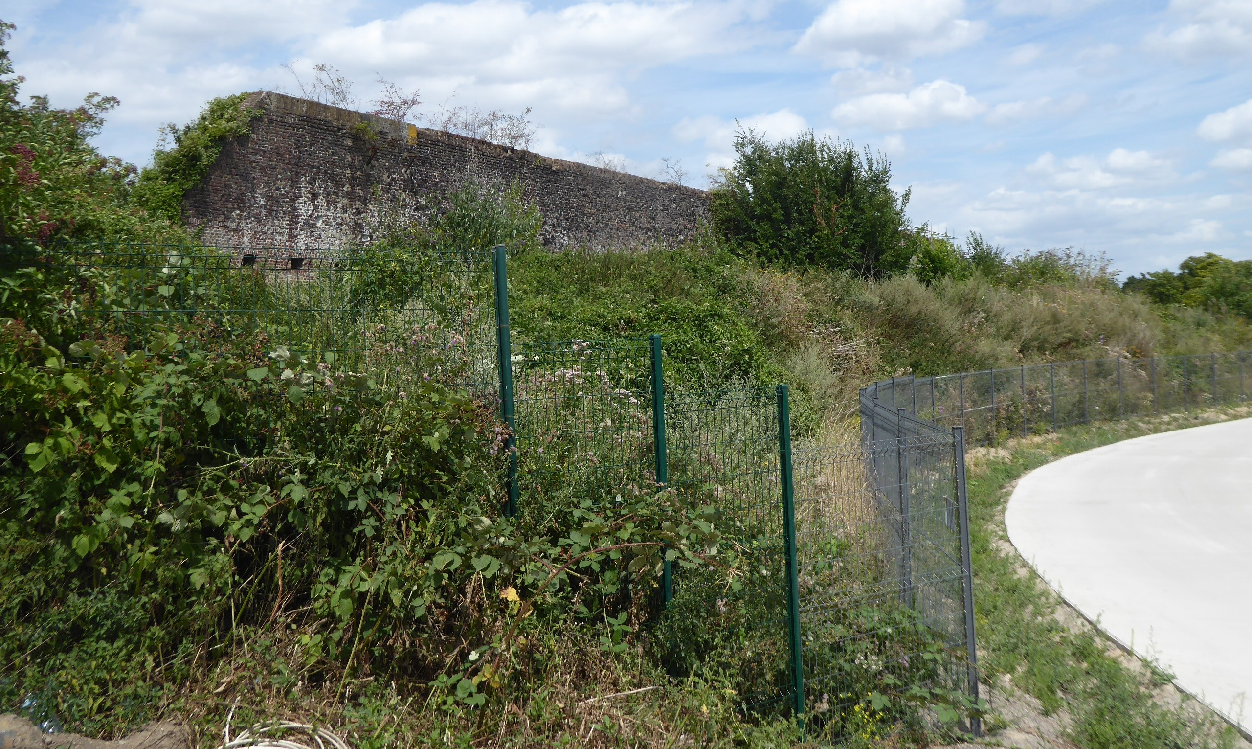 Mur de communication